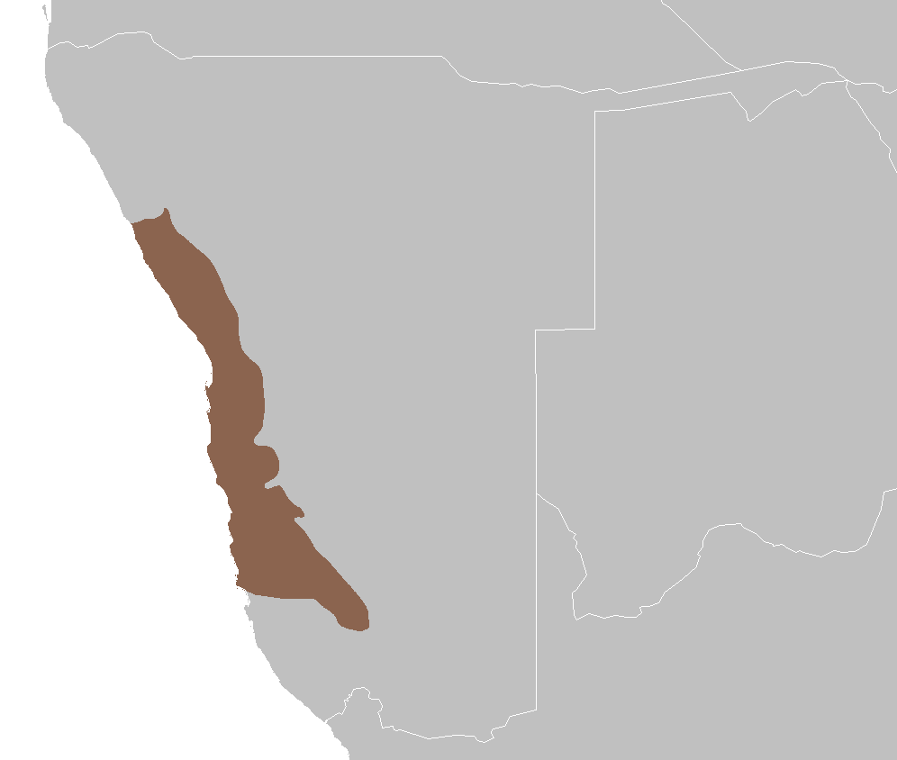 Namib desert ecoregion map